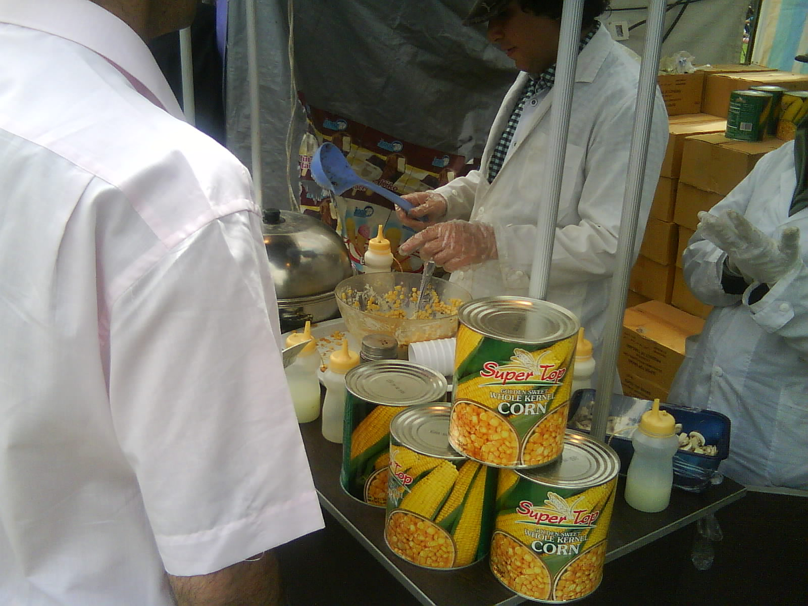 ذرت مکزیکی